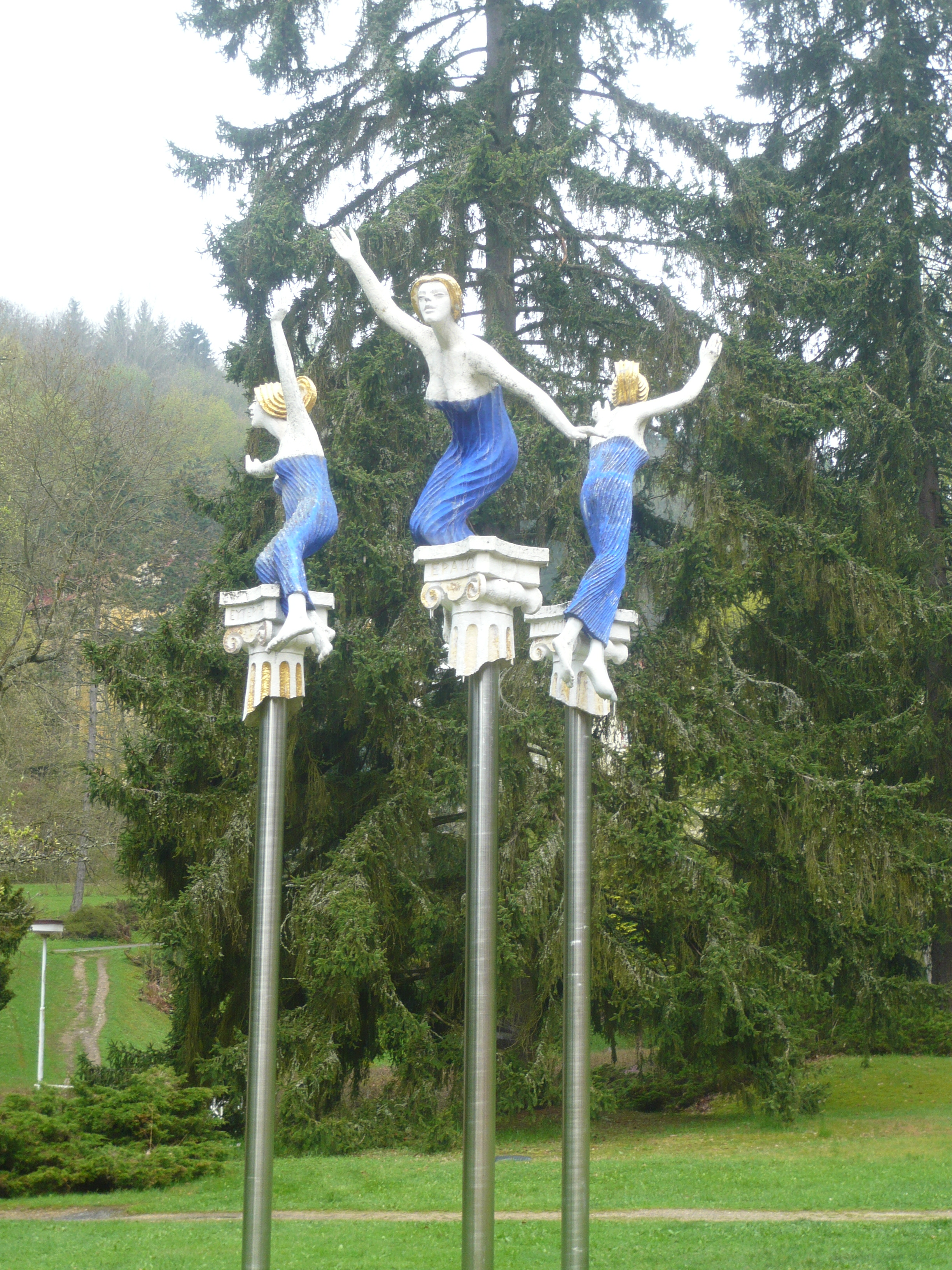 Tři Grácie, Lesní pramen, Mariánské Lázně